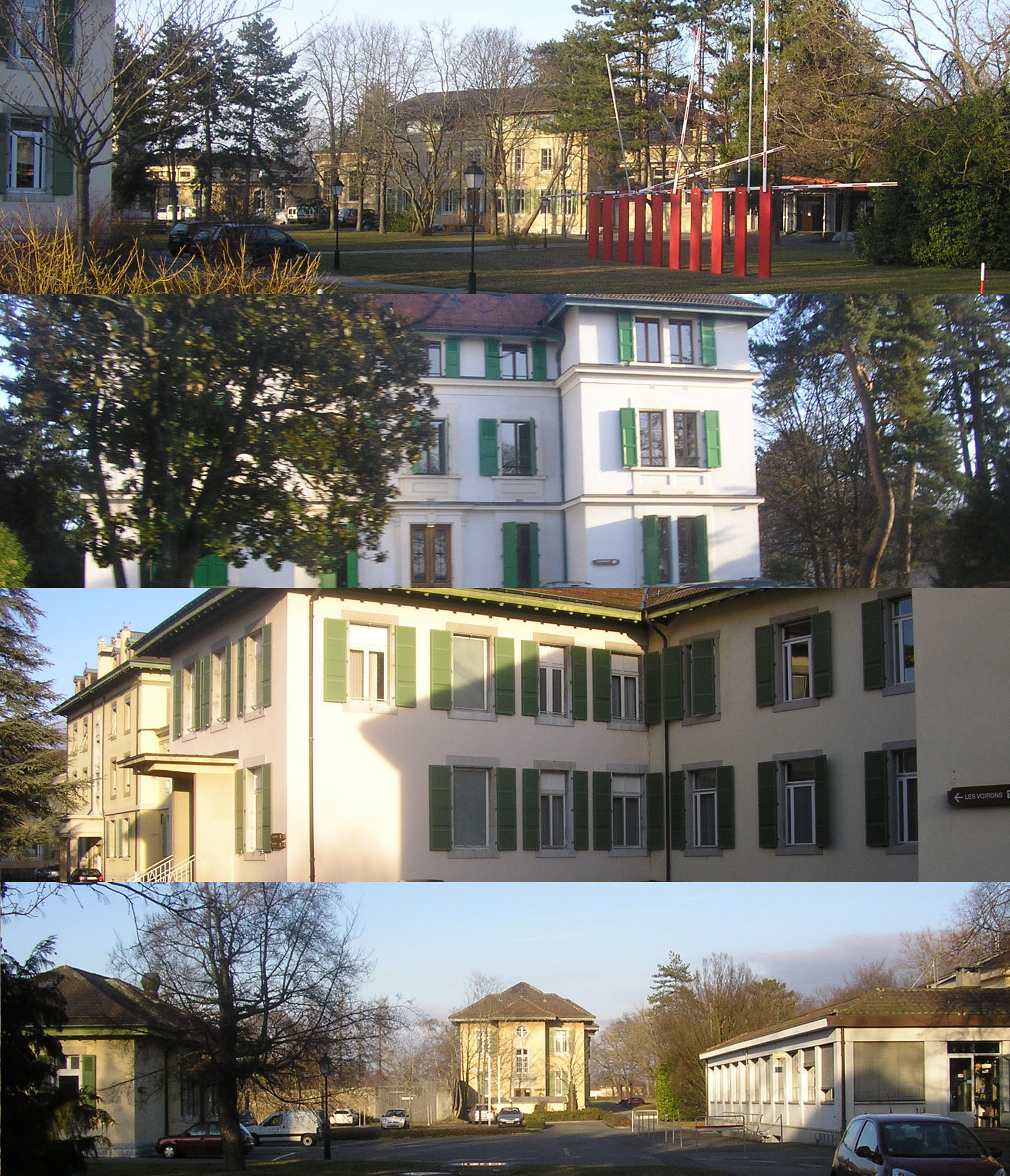 Cinq panoramas du parc et des bâtiments de la Clinique de Belle-Idée à Genève.